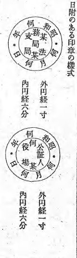 官報号外第70号(1949年06月01日)、法務府令第11号、確定日附簿及び日附印章調製規則における附録様式より。登記所（法務局および地方法務局）と公証人役場において押印される確定日付印の様式。